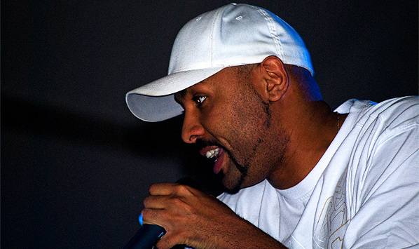 Foto tomada el 07/05/09 en el concierto de Hip-Hop del Area Joven 2009, en Azuqueca de Henares.